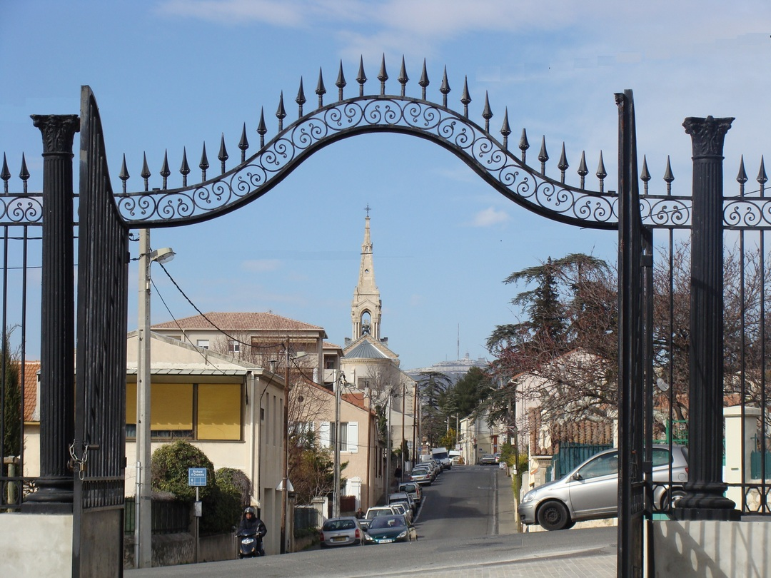 L'église de Montolivet (Marseille, 12e) vue depuis le parc de la Moline ; au fond, l'émetteur de télévision de l'Étoile